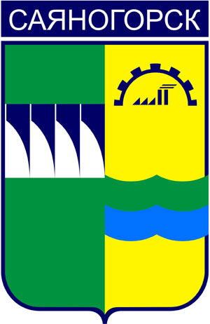 Герб города Саяногорска